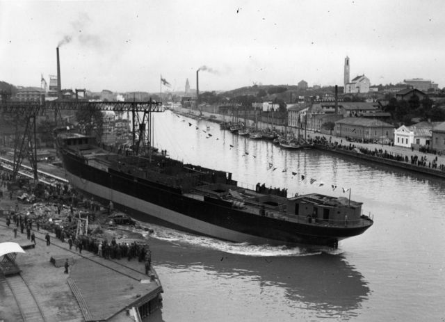 Alkuperäinen kuvaus: s/s Rigel I, vesillelasku Ab Crichton-Vulcan Oy:n telakalla